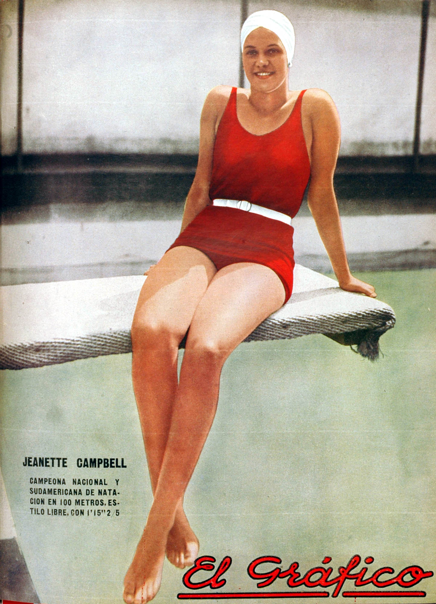 El Grafico del 17 de Marzo de 1934. Edicion 766